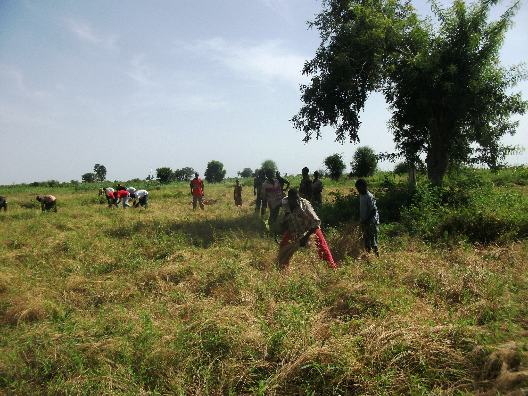 Jeunes du village aidant une famille pour la moisson du fonio (Mali)